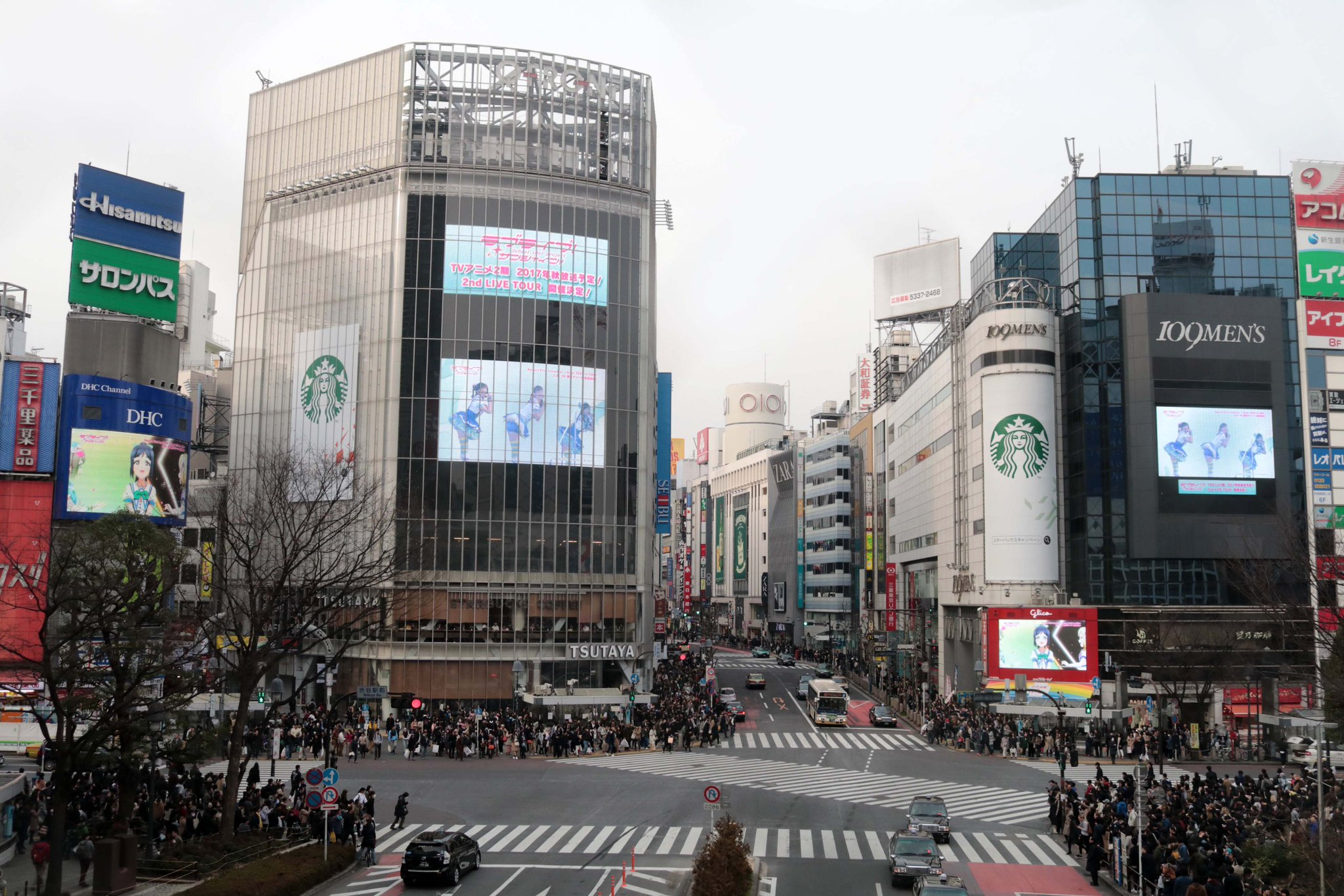 渋谷区のデジタルサイネージの例